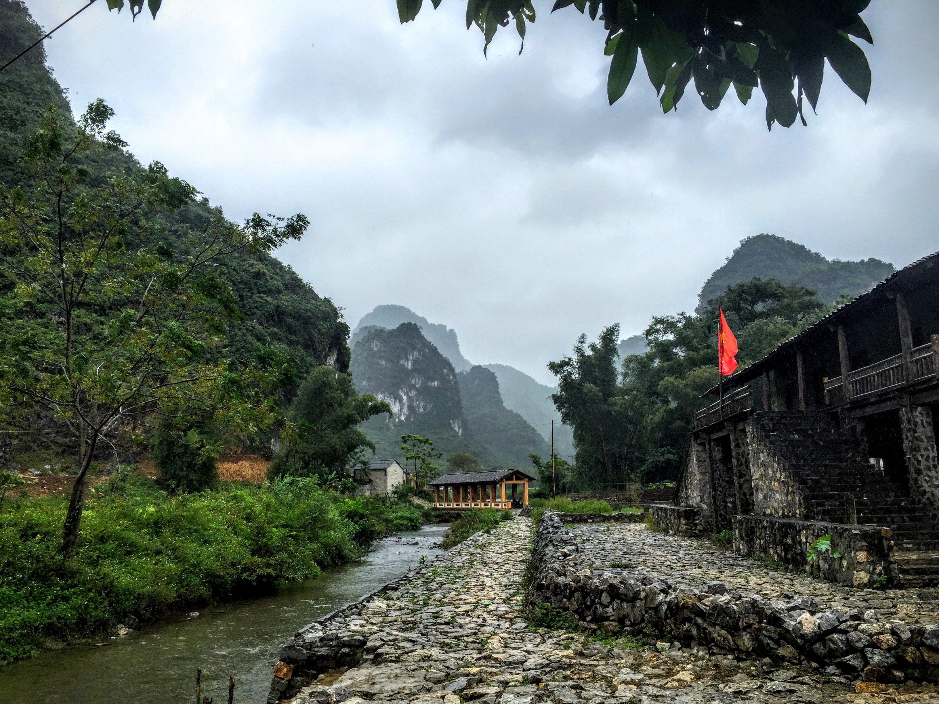 Lang van hoa Dan toc Tay, Dam Thuy, Trung khanh, Cao bang, Vietnam